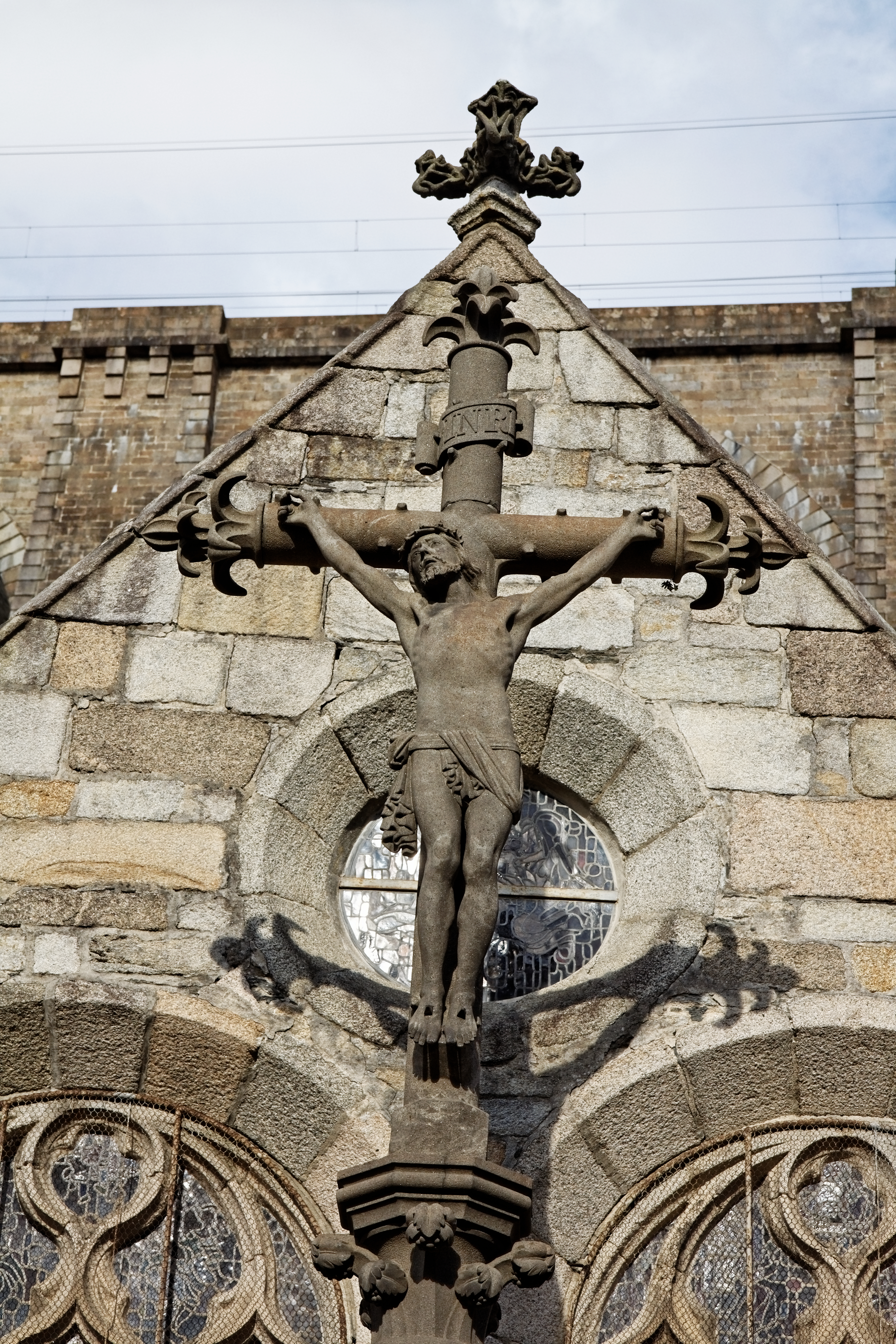 Vue de l'église Saint-Mélaine à Morlaix.